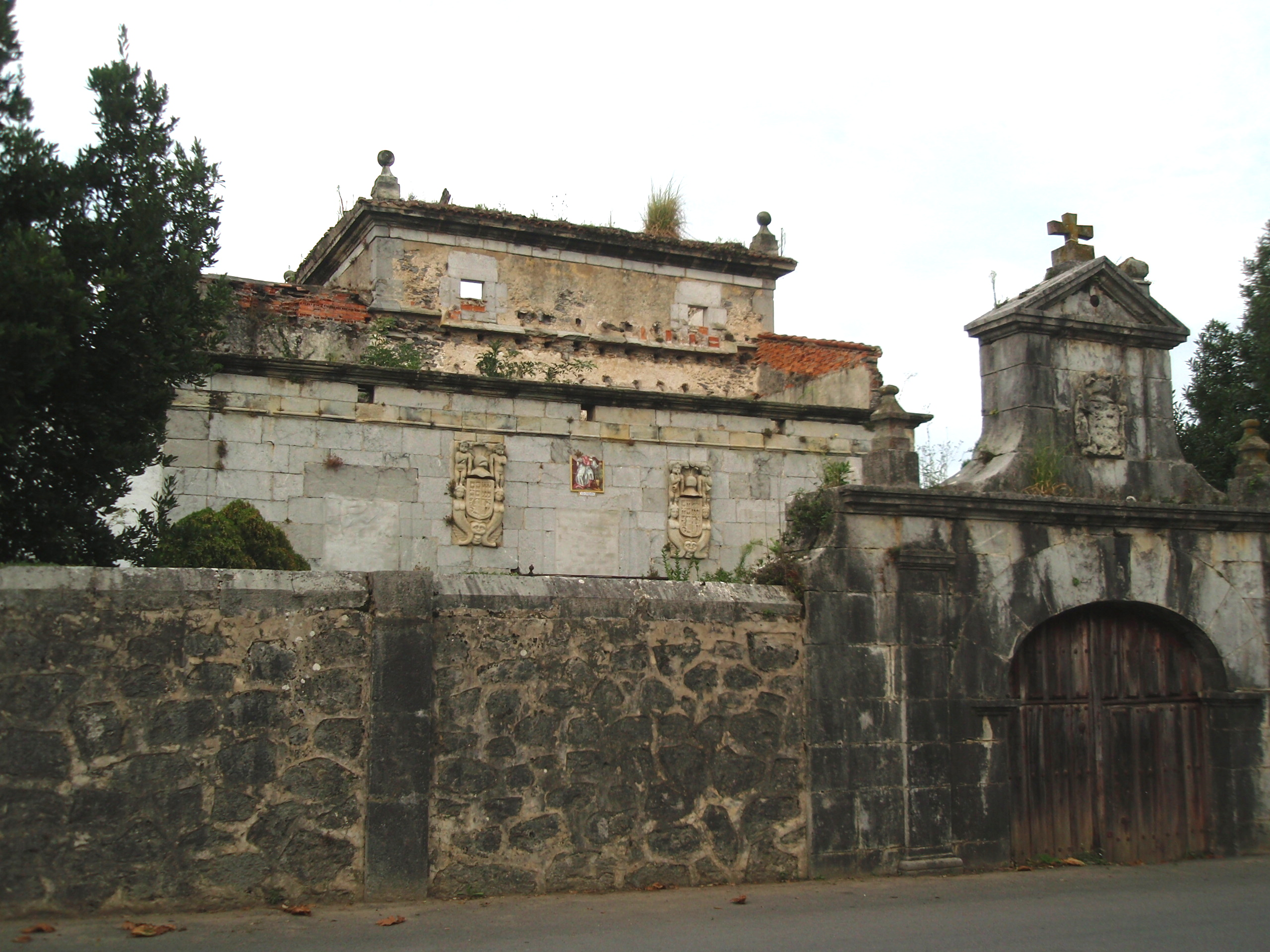 Exterior del Palacio Torre de la Calle el Carmen, en Noja; claramente abandonado.